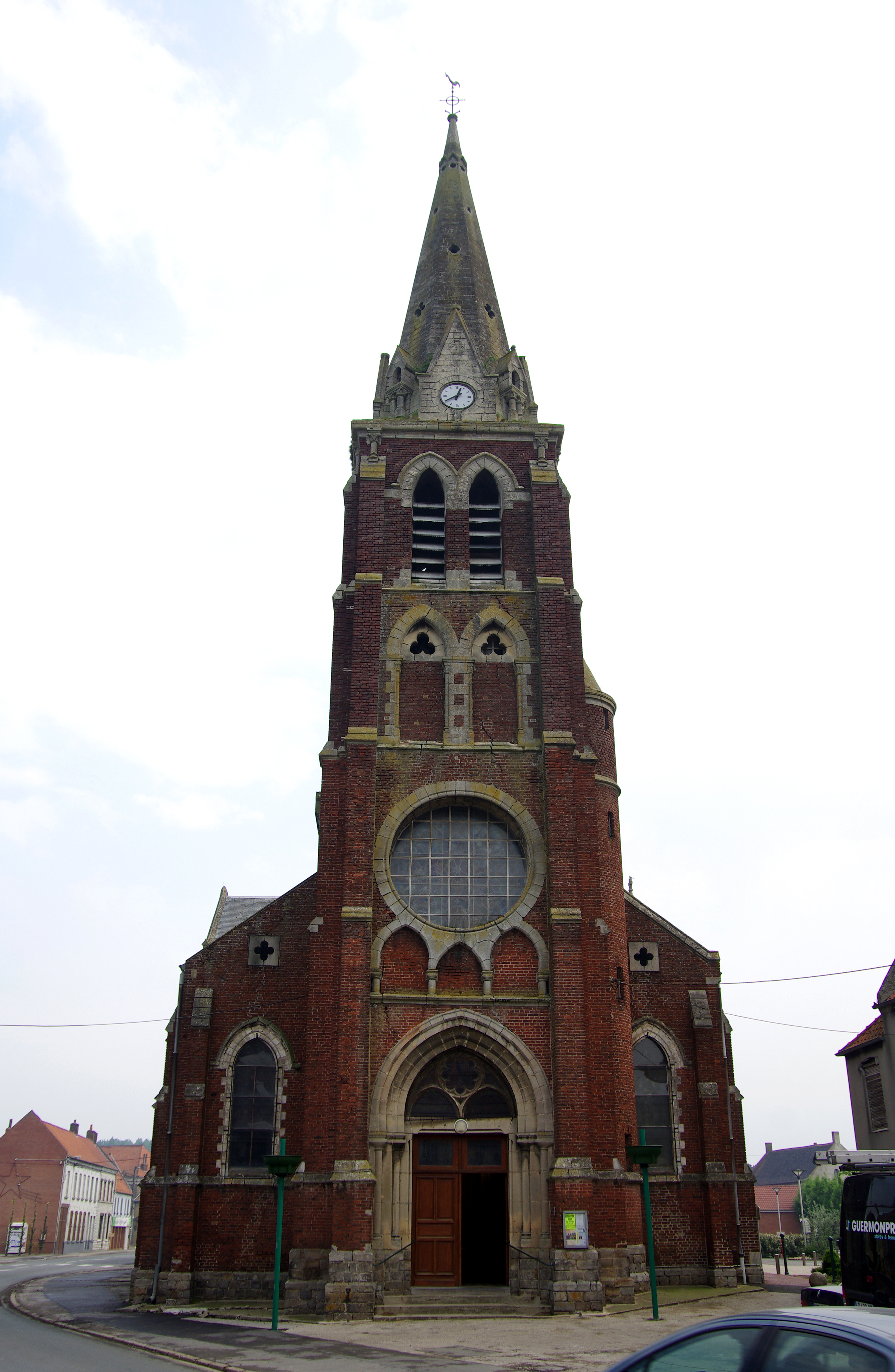 Busnes (Pas-de-Calais, France) - L'église Saint-Paul. Elle se caractérise en particulier par 4 immenses "rosaces" (en façade, au-dessus du portail, au chevet, et à chacune des extrémités du transept). L'édifice mériterait quelques travaux de restauration (ou de "simple" 'entretien). On remarque en effet de nombreuses fissures sur la façade et sur la tour du clocher. .